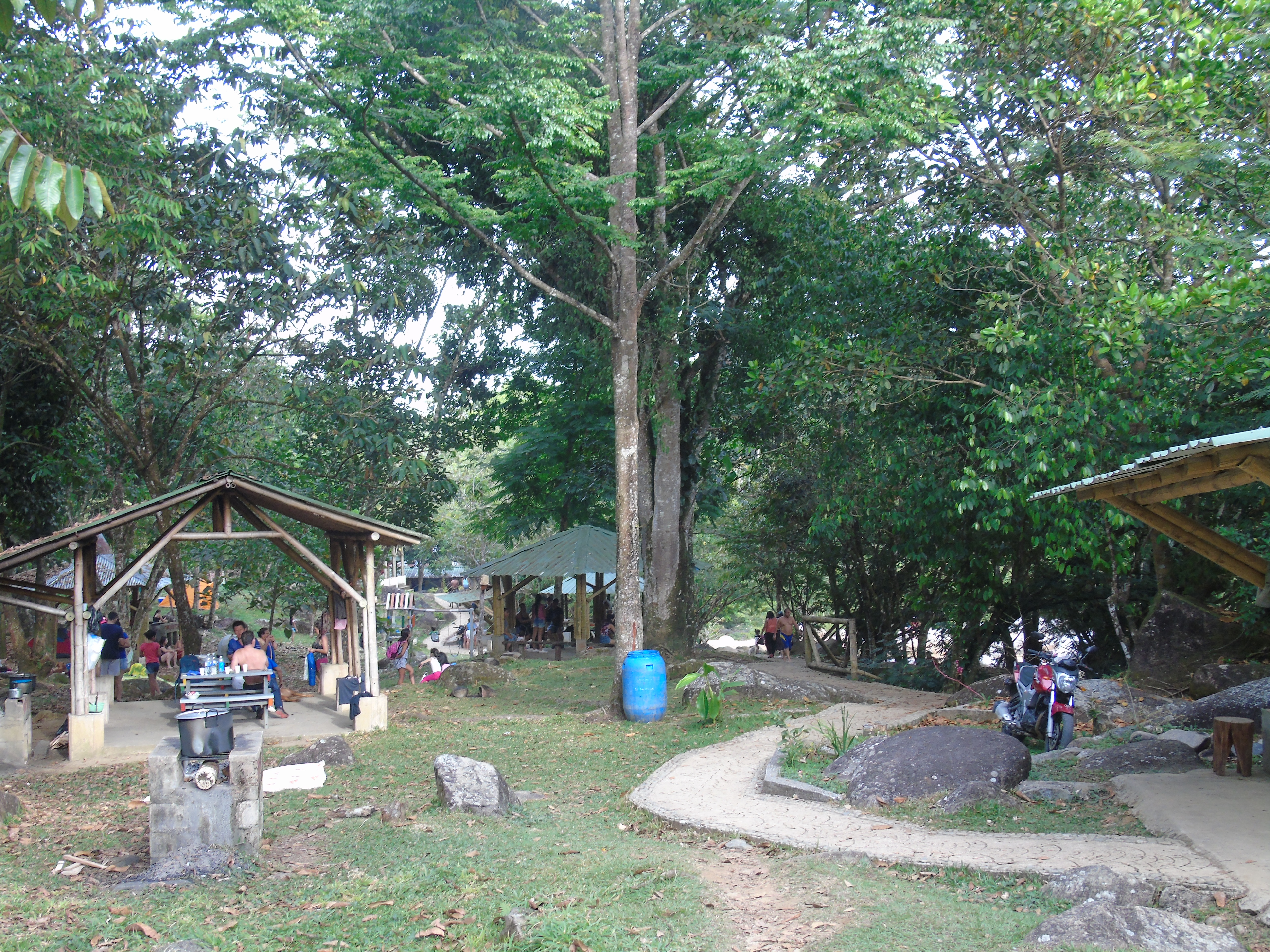 Kioskos, senderos y Zonas de camping en el Sendero Ecológico El Balseadero San Luis Antioquia